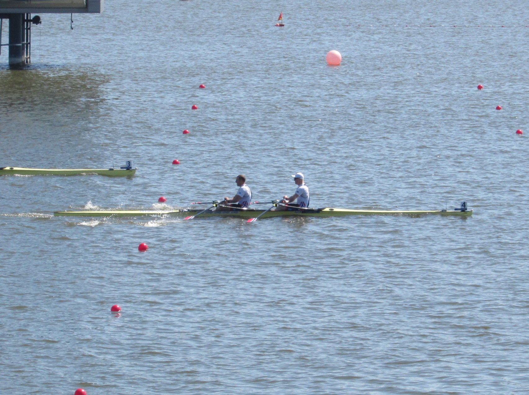 Olaf Tufte und Kjetil Borch im Doppelzweier bei der Ruder-EM 2016; Halbfinallauf